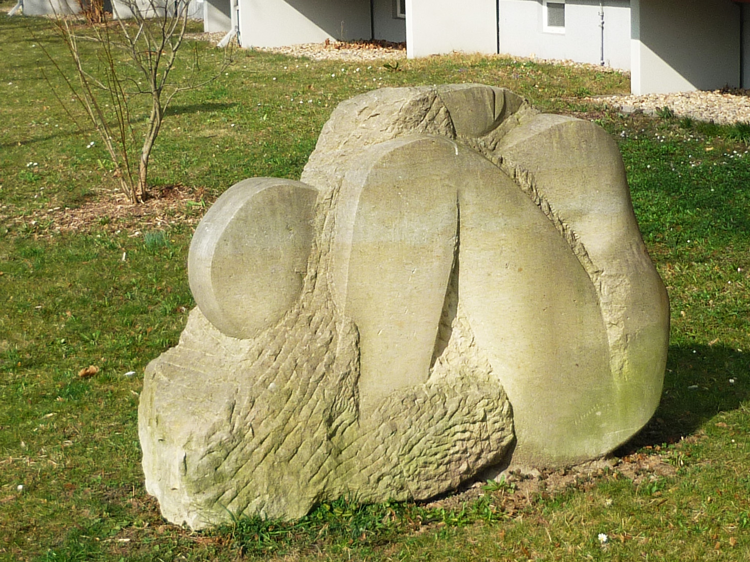 Doppelrelief „Große Sonnenanbeterin“ von Lothar Beck (* 1953) in der Striesener Str. in Dresden-Johannstadt (Bildhauersymposium „Sandstein & Platte“, 2007)